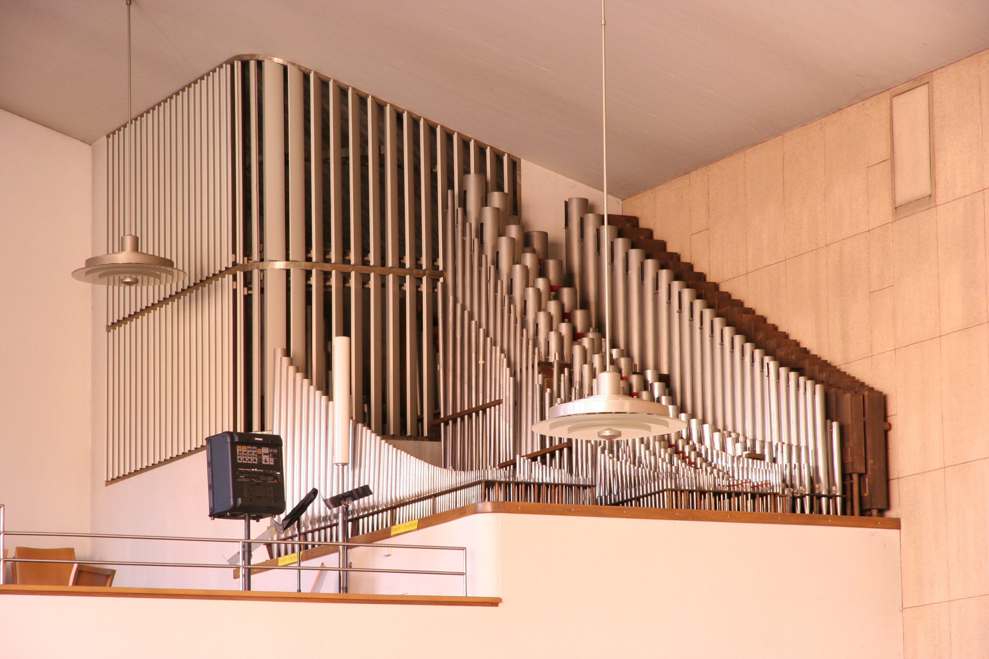 Römisch-katholische Pfarrkirche St. Gallus Oberuzwil